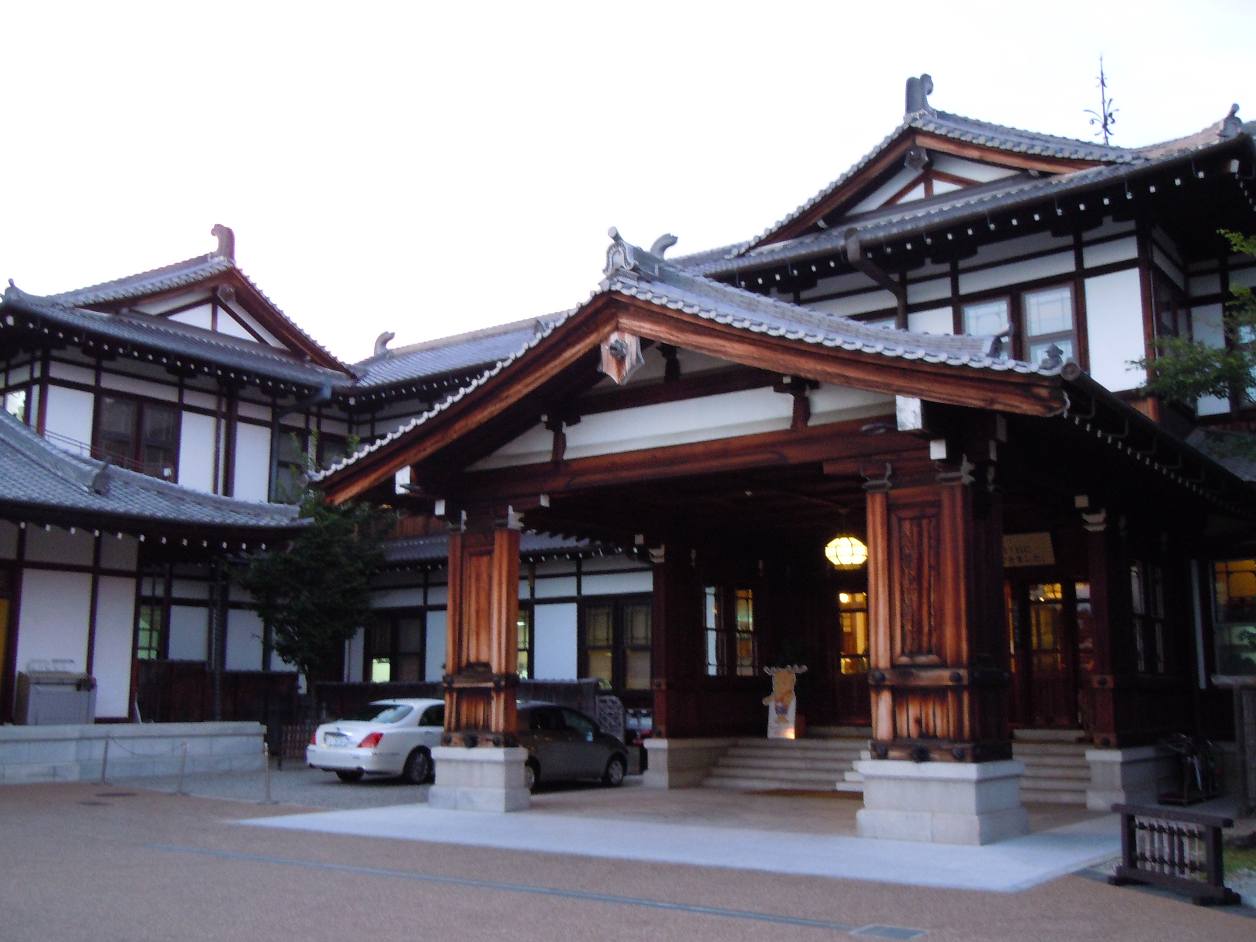 Nara Hotel